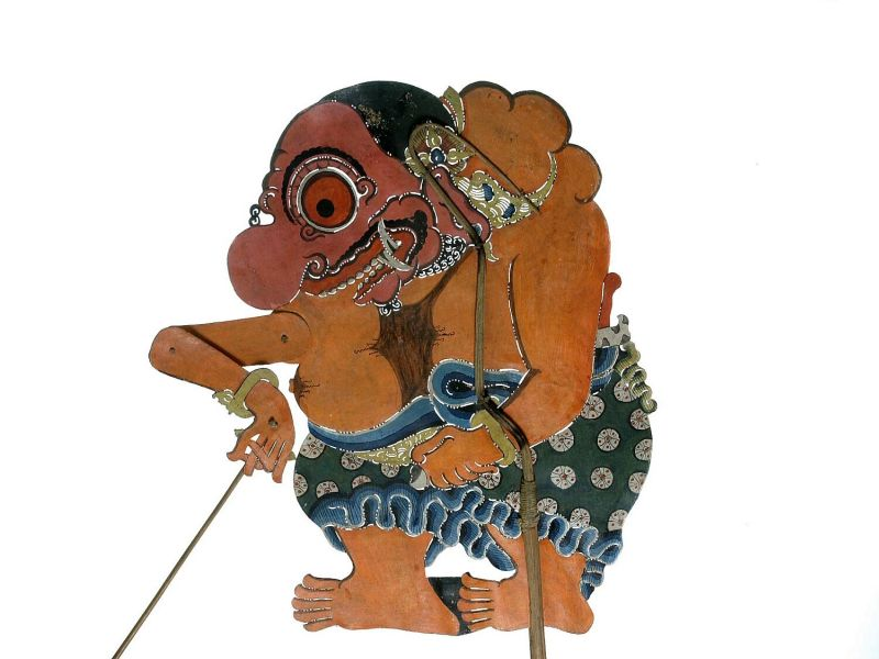 Schaduwfiguur. Wajangpop, voorstellende buta Terong Unknown language: Wayang kulit purwa